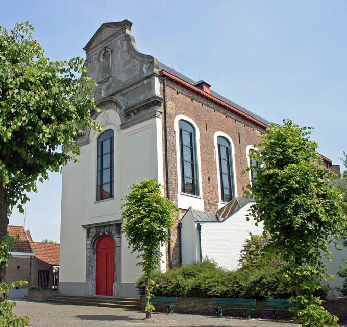 Voormalige kerk van een kartuizerklooster, thans onderdeel van het Brugse gerechtshof.